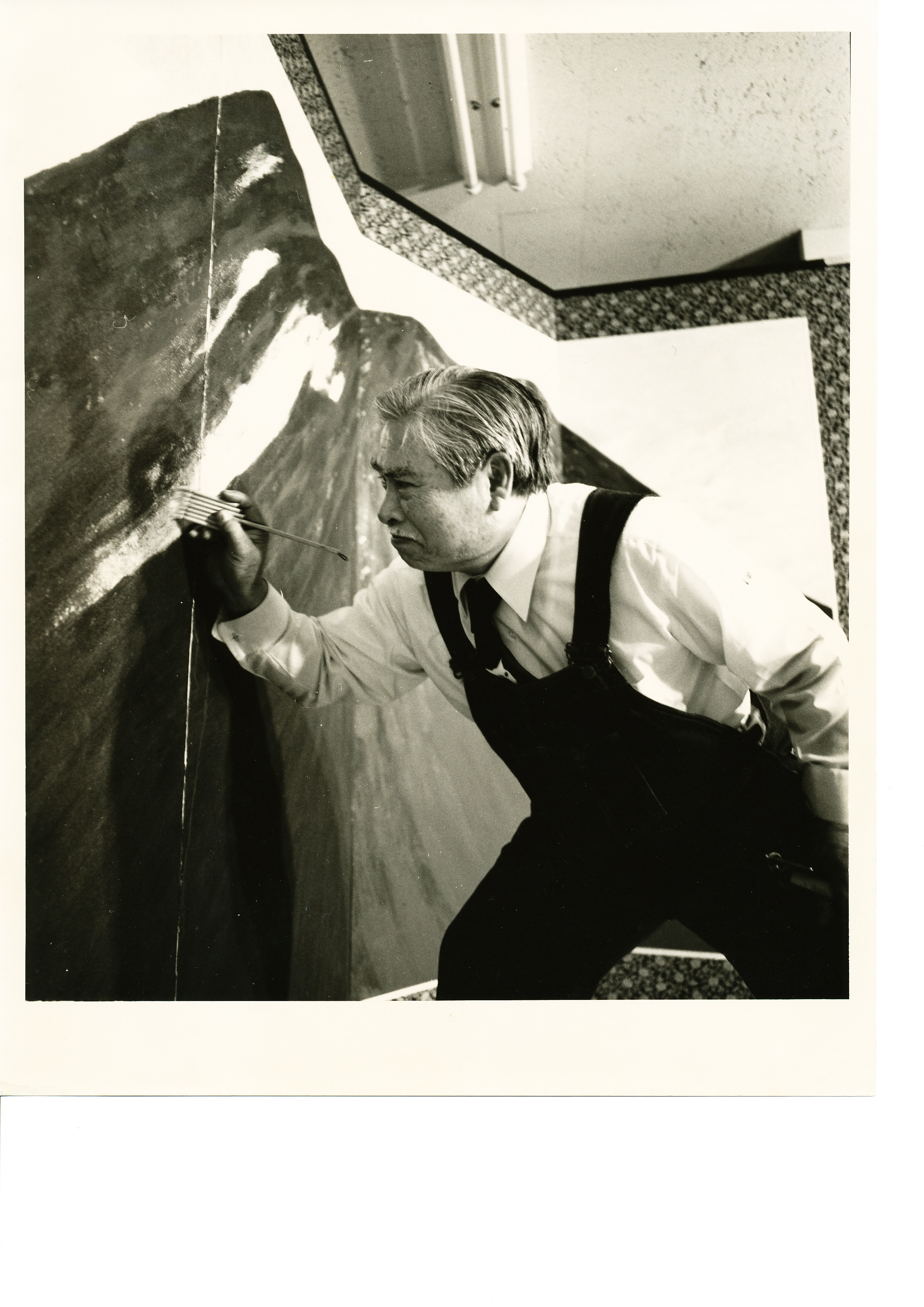 橘 天敬の写真